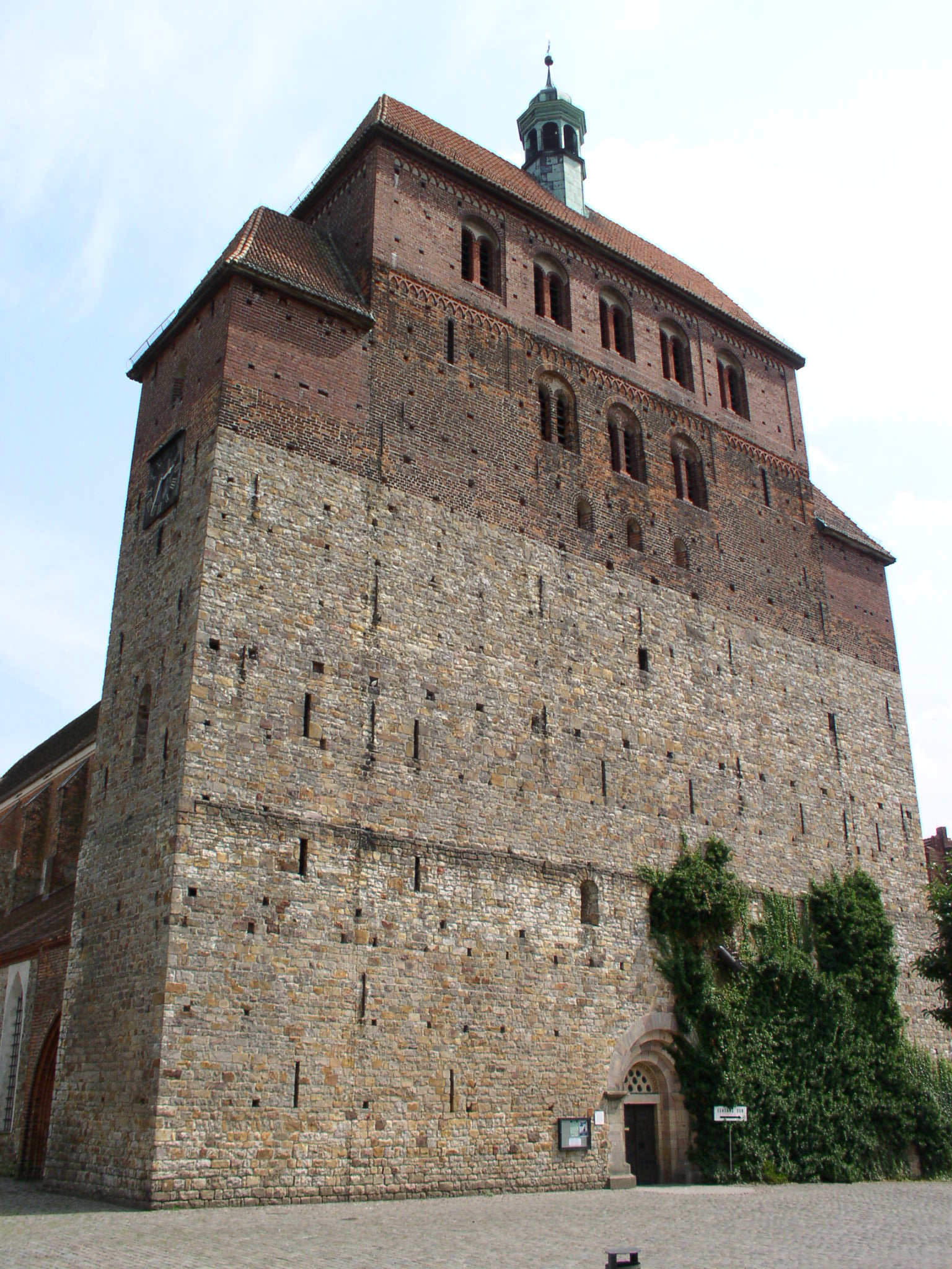 Westbau des Doms zu Havelberg